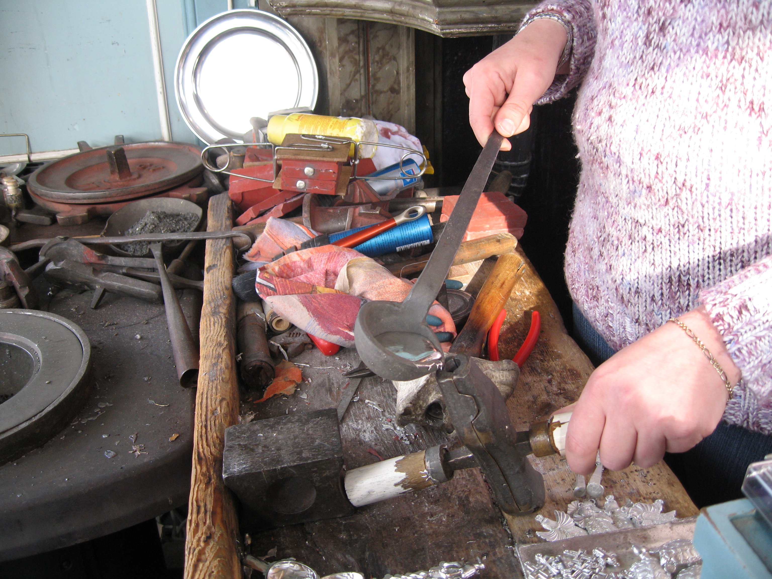 Tingieten. De vloeibare tin wordt in de mal gegoten Foto gemaakt door Ellywa op 23 februari 2007 in de Tinkoepel aan de Zaanse Schans, Zaandam. Met dank aan mw. I.J. Blaauboer, Fluid tin into the mold Picture by Ellywa on February 23, 2007, in the Tinkoepel in Zaandam, The Netherlands. With thanks to mrs. I.J. Blaauboer